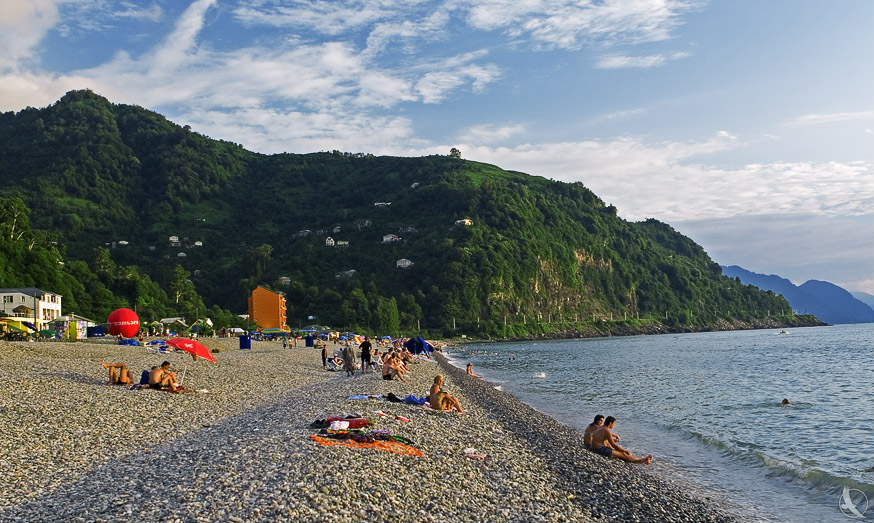 Kvariati pludmale.